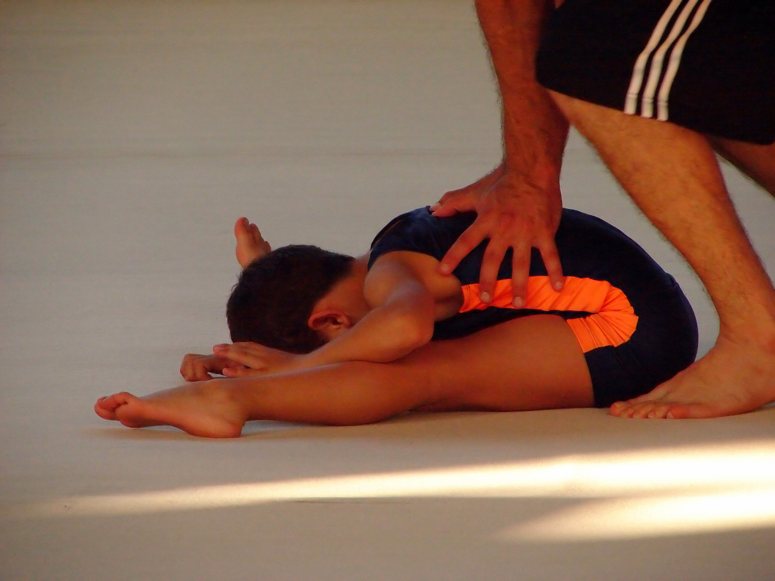 Gymnastics, GSGM, Bağlarbaşı Spor Salonu